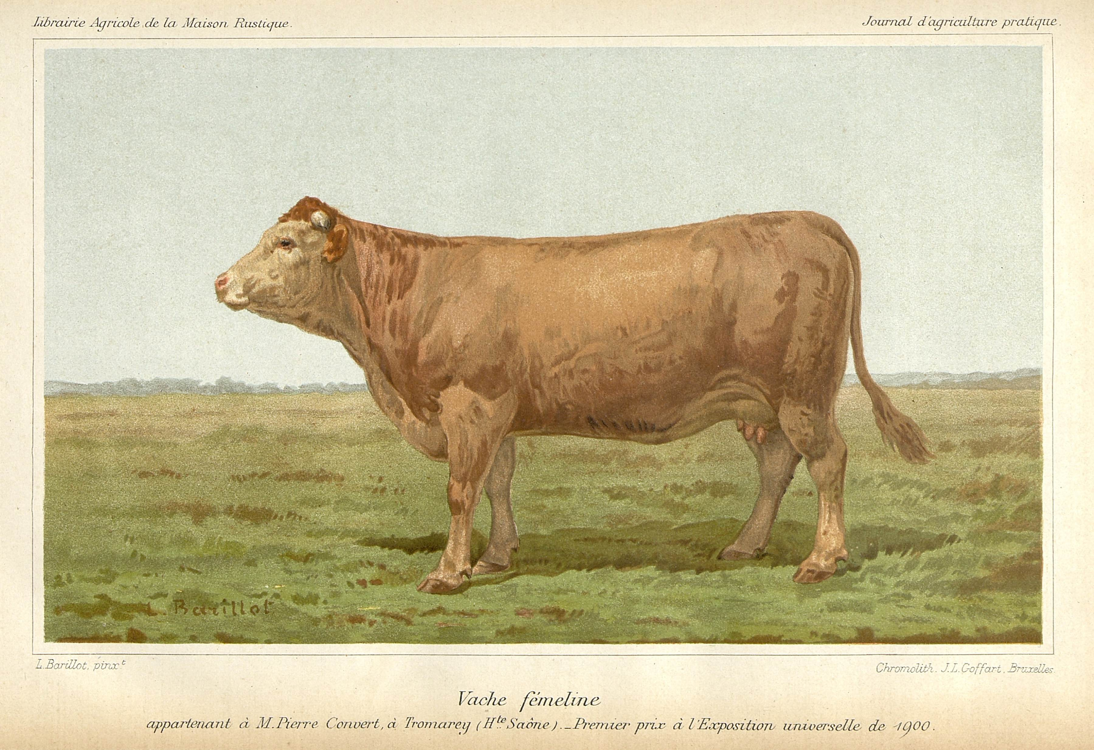 Illustration issue de l'article "La race bovine fémeline", Hector George, Journal d'agriculture pratique, de jardinage et d'économie domestique, Paris, Librairie agricole de la maison rustique, 1902, volume 2, p. 183-185. La planche coloriée représente une vache de race fémeline ayant remporté le 1er prix à l'Exposition universelle de 1900. Ouvrage appartenant à la Bibliothèque historique du ministère de l'Agriculture, déposée à la MRSH Caen. Fichier : UNICAEN_B_141182210_JAP_1902_2_184_01